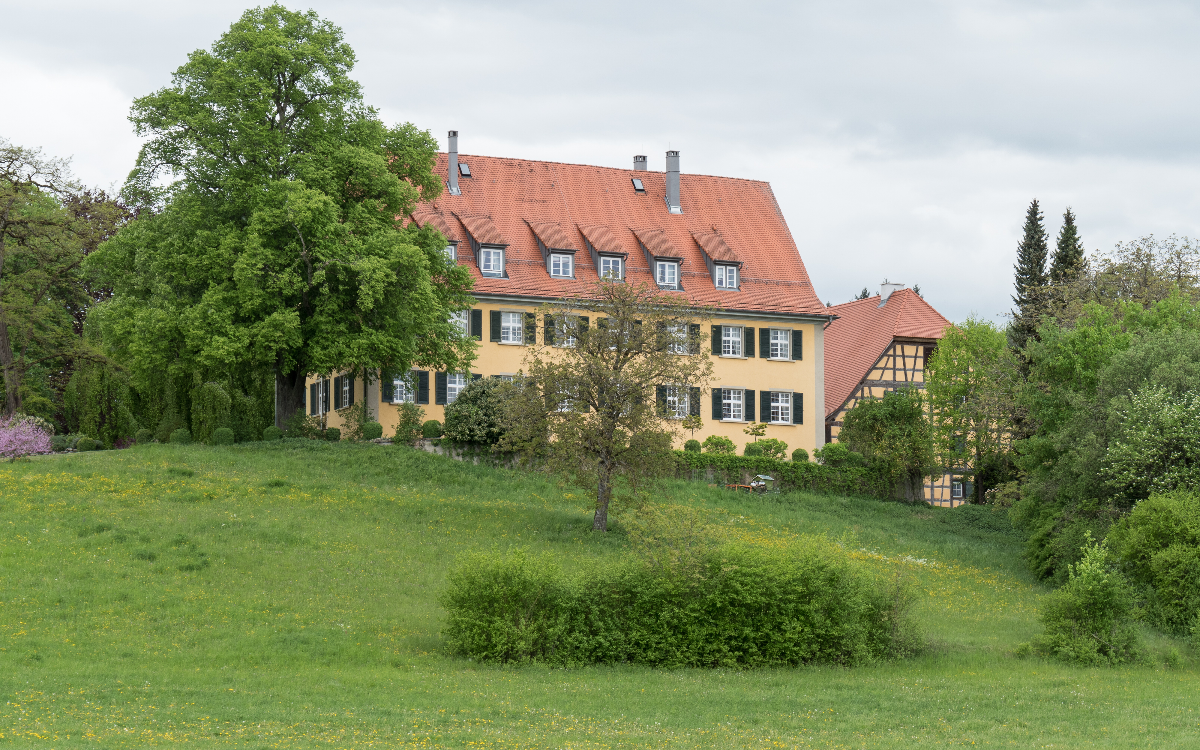 Ost-Südost-Ansicht des spätbarocken Schlosses Langenrain in der Gemeinde Allensbach (Bodensee)